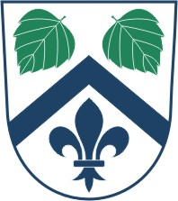 Březolupy